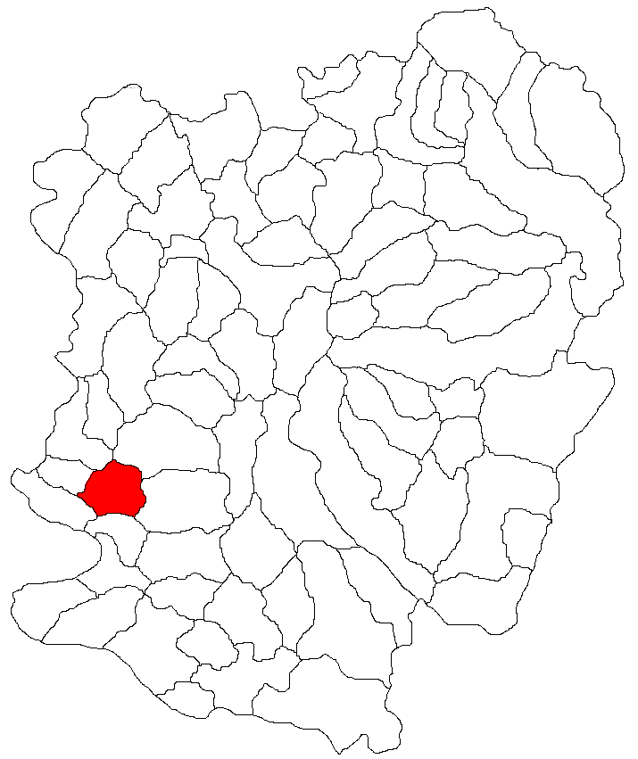 Categorie:Hărţi ale judeţului Caraş-Severin